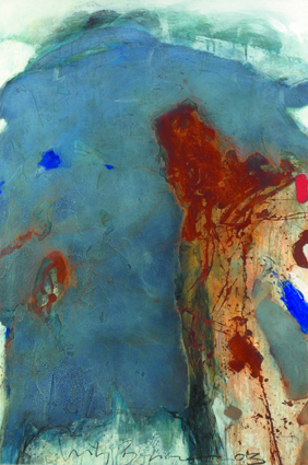 Malerei mit dem Titel "Begegnungen 1" des Künstlers Lutz Bernsau